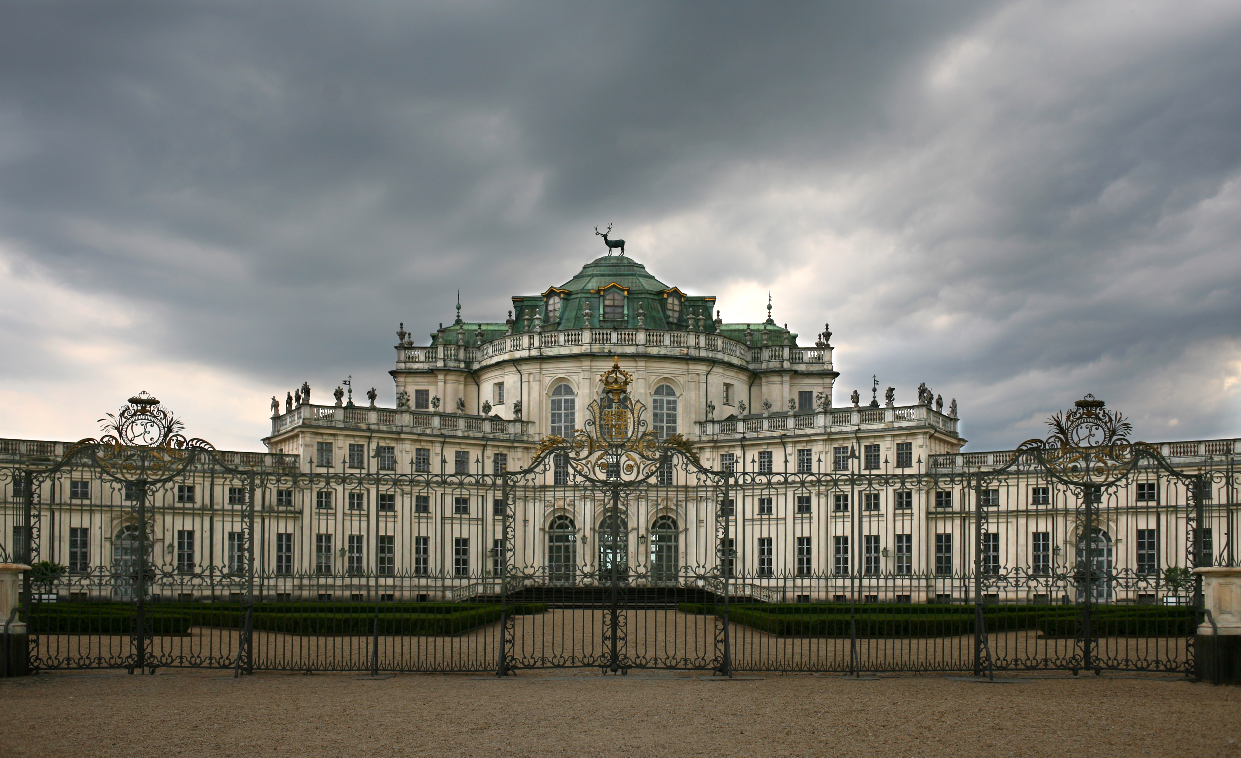 La palazzina di caccia di Stupinigi (Filippo Juvarra, 1729-1733) vista della facciata con cancellata